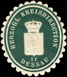 Sealing stamp Title: Herzogliche Kreisdirection zu Dessau Description: dunkelgrün, weiß, geprägt Place: Dessau size: 4x3 cm